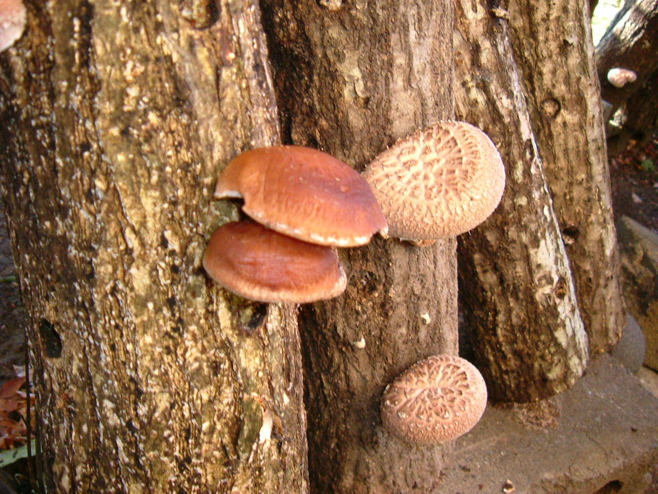 Shiitake mushroom. 自家栽培のシイタケ on Konara (Quercus serrata) logs